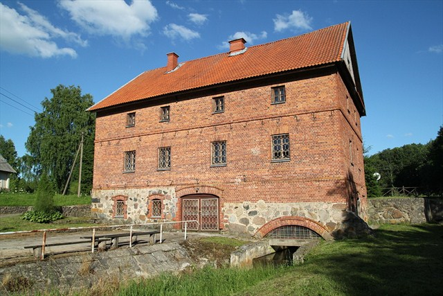 Siesarties malūnas iš užtvankos pusės